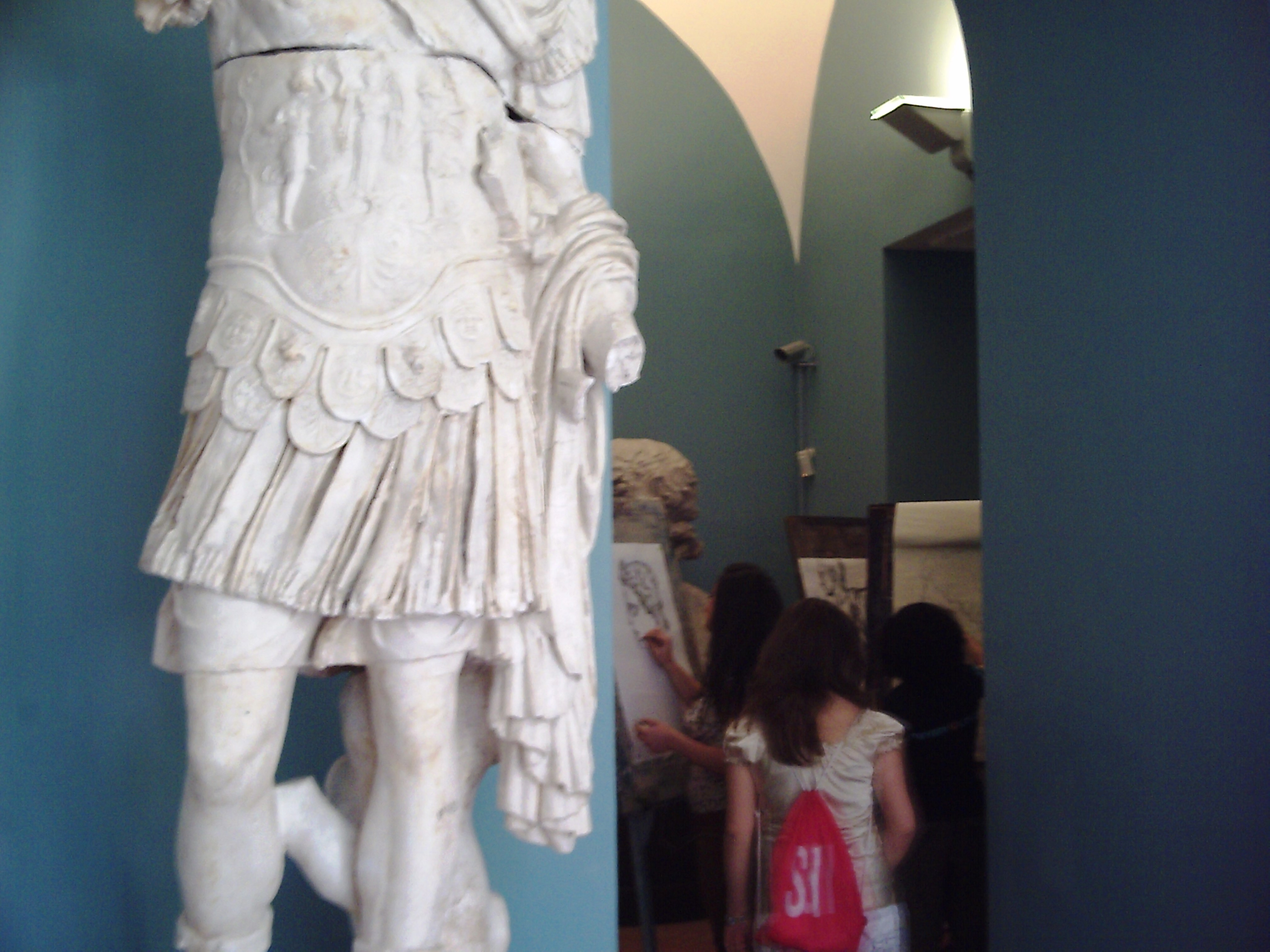 Gipsoteca dell'Accademia di Belle Arti di Napoli